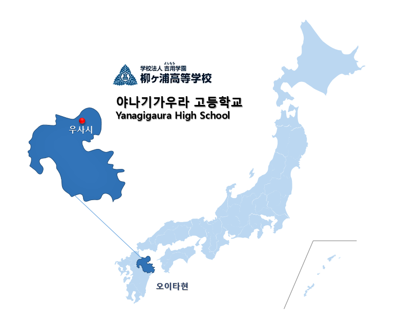 yanagigaura 지도